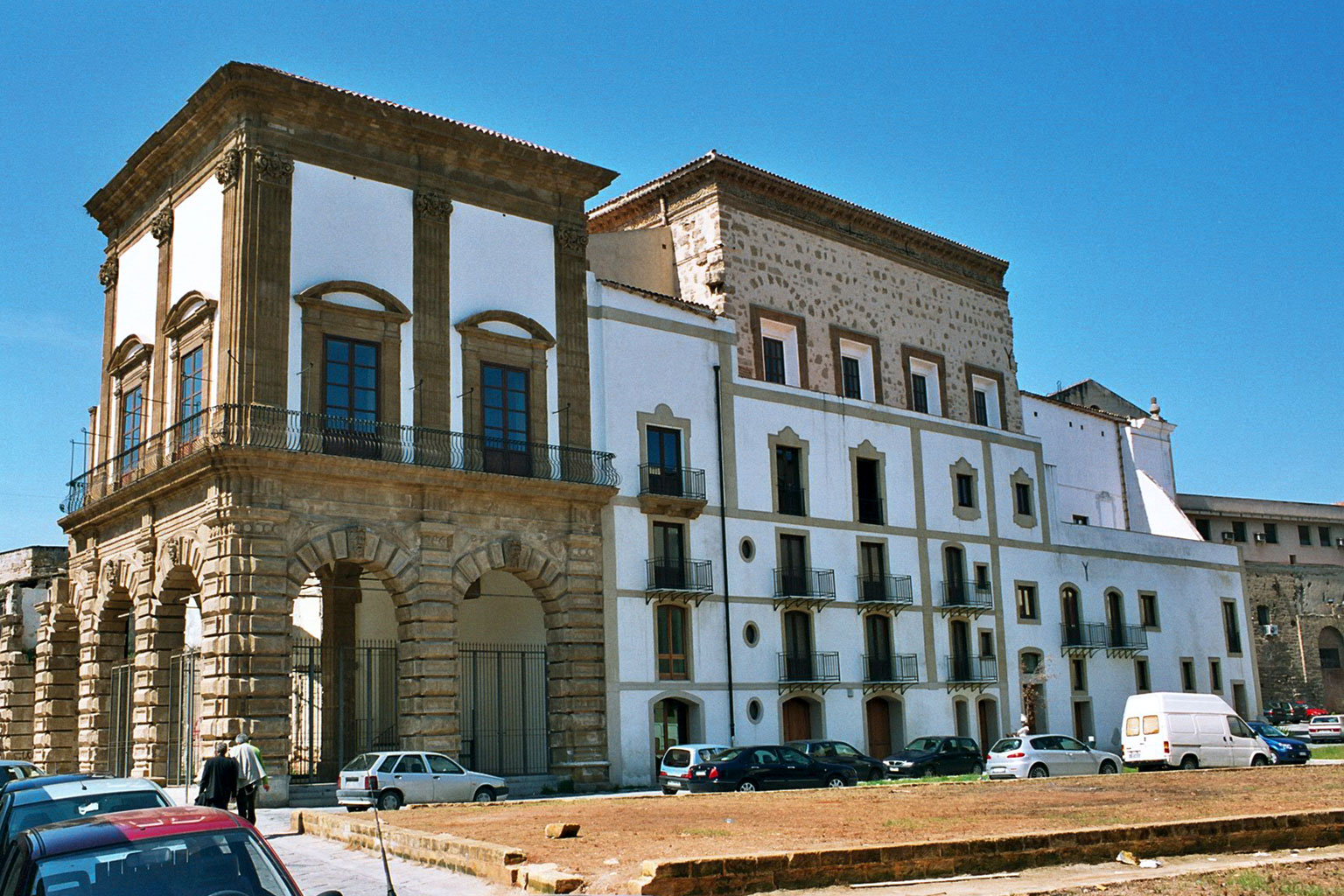 Oratorio dei Bianchi, Palermo